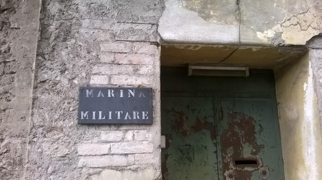 Particolare dei fabbricati dell'ex SPEA (Società Prodotti Esplodenti Autarchici) di Narni Scalo. Da notare il cartello con scritto Marina Militare: il terreno fu di proprietà della Forza Armata fino ai primi anni Duemila.